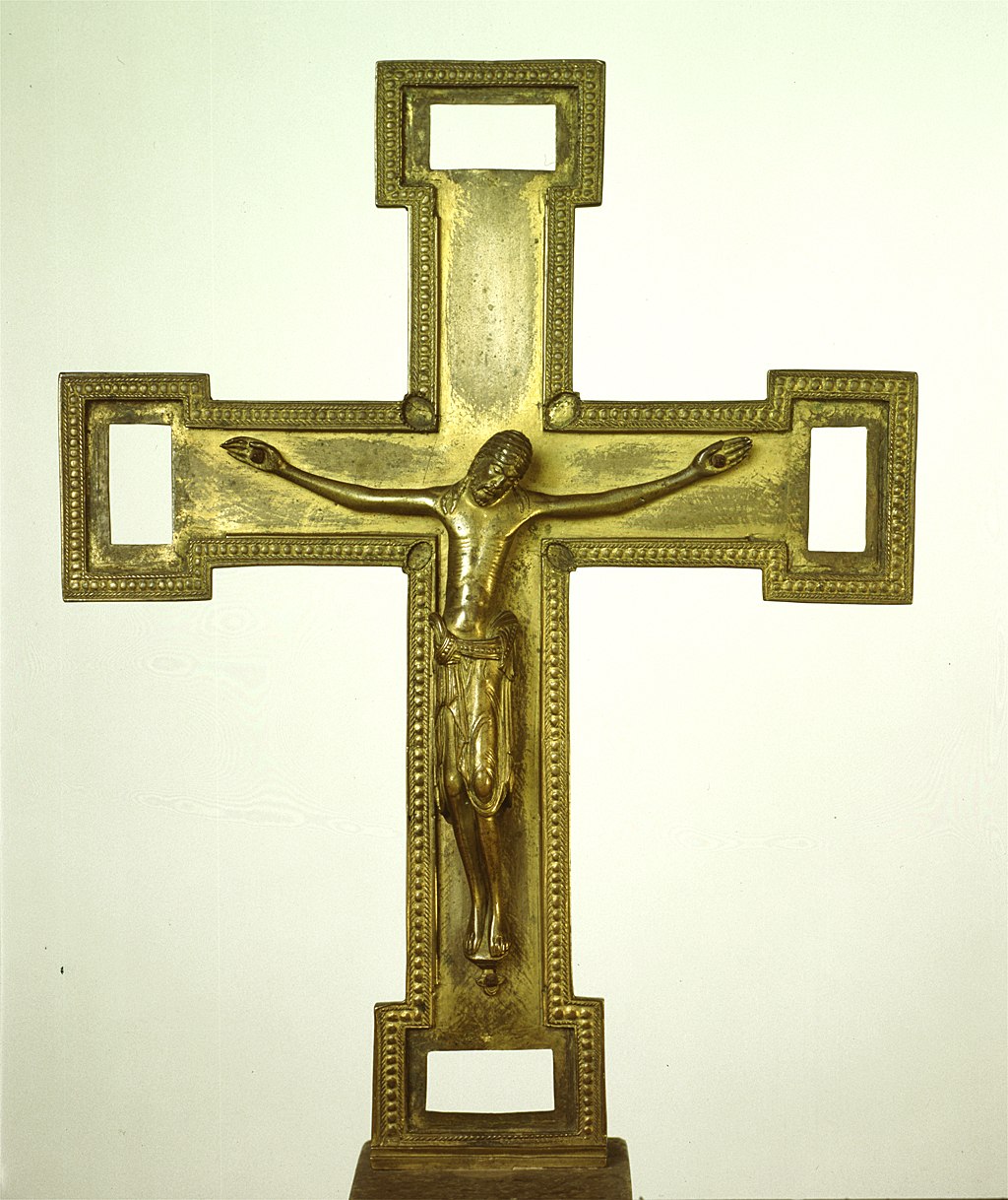 Kruzifix Gesamtansicht (in den Fehlstellen am Kreuzende befanden sich ursprünglich wohl Steine, vermutlich Bergkristalle)